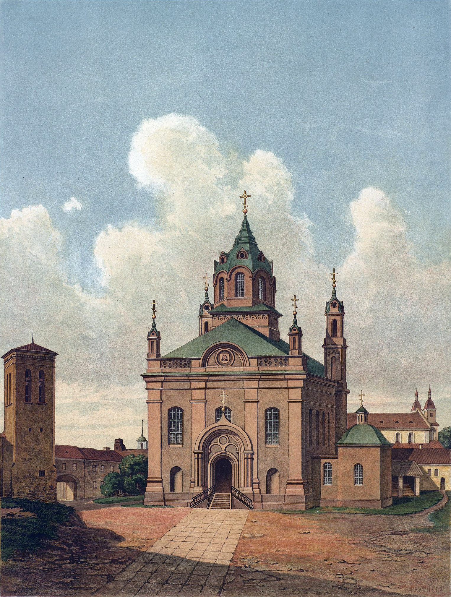 Беларуская (тарашкевіца): Вільня (Vilnia), вуліца Вастрабрамская (vulica Vastrabramskaja). Царква Сьвятой Тройцы па маскоўскай перабудове